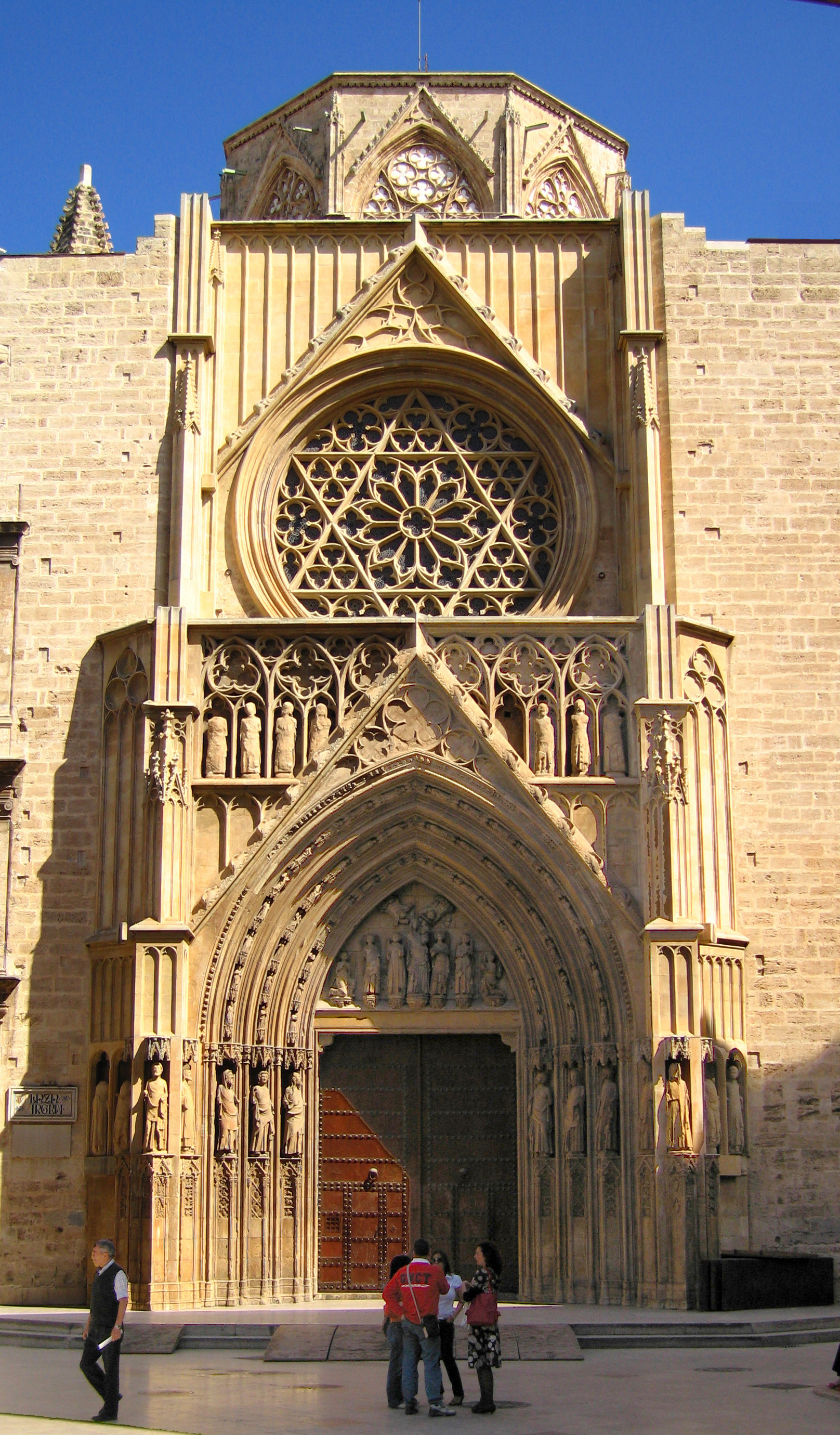 Porta apòstols Seu València